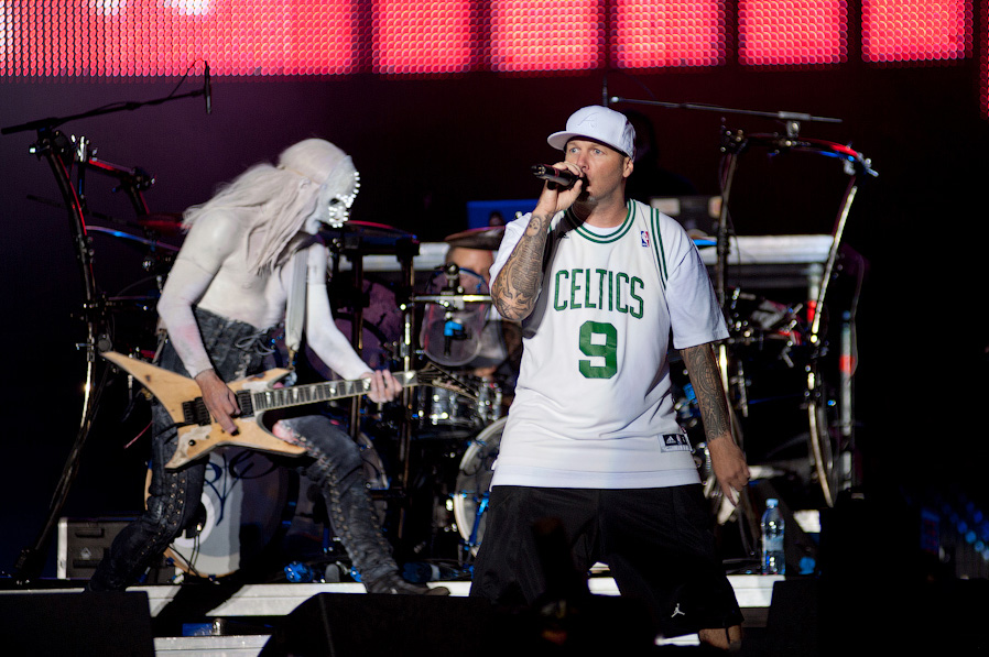 Limp Bizkit, фестиваль "Рок над Волгой" 2012